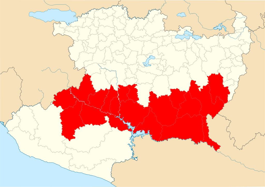 Mapa de Tierra Caliente estado de Michoacan